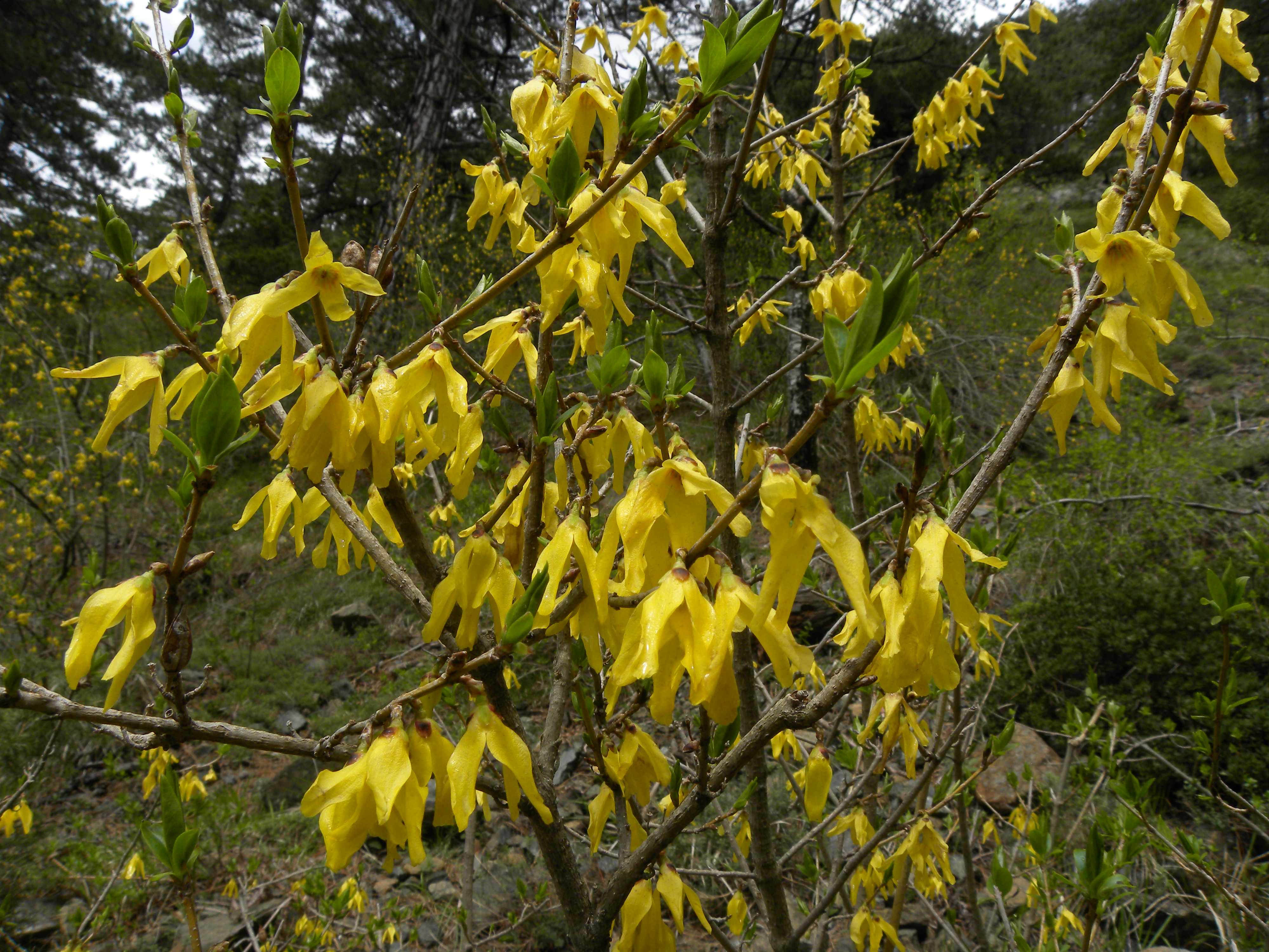 Europäische Forsythie am Naturstandort in Albanien